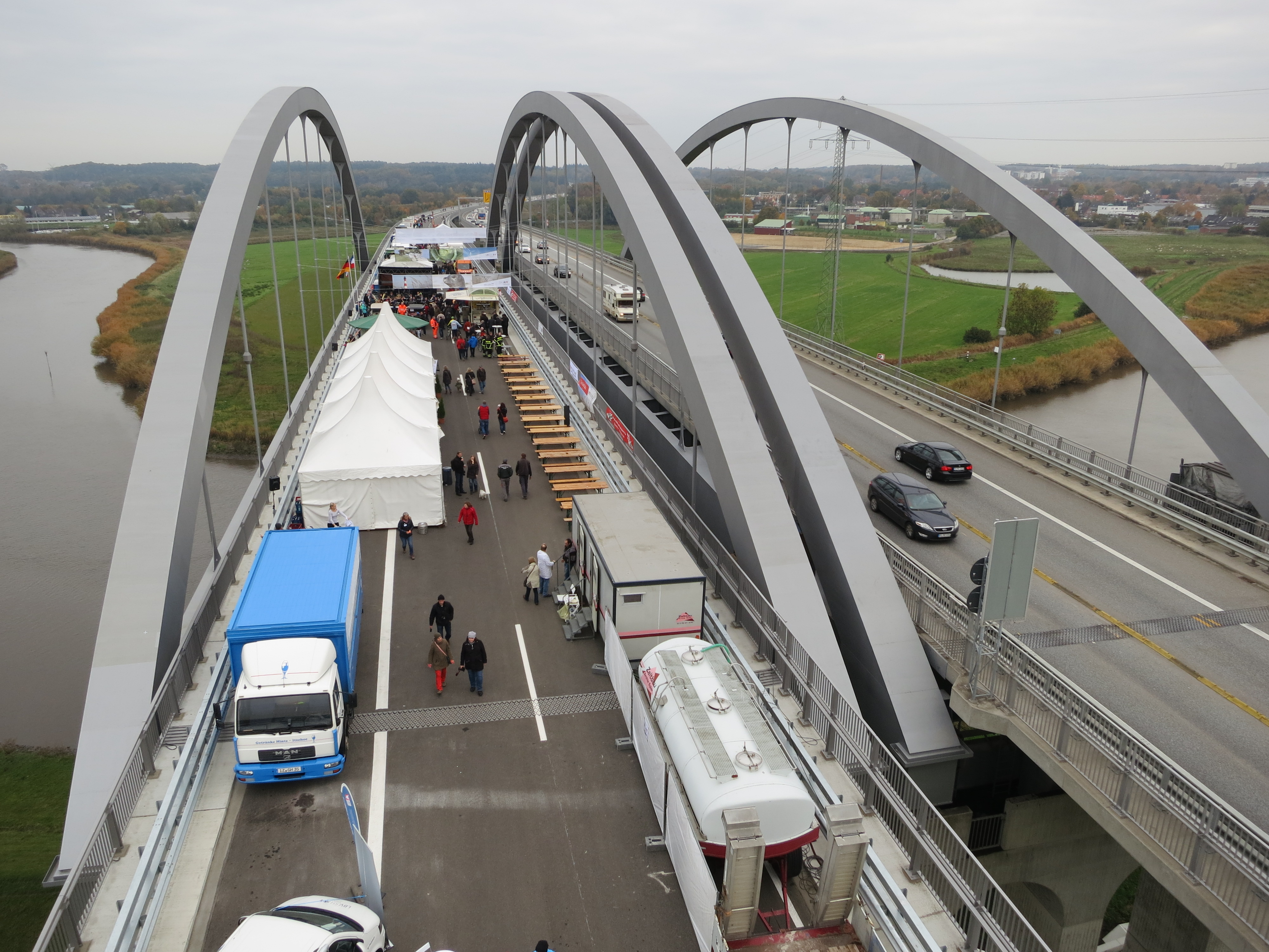 Eröffnung der westlichen Störbrücke der A23 bei Itzehoe